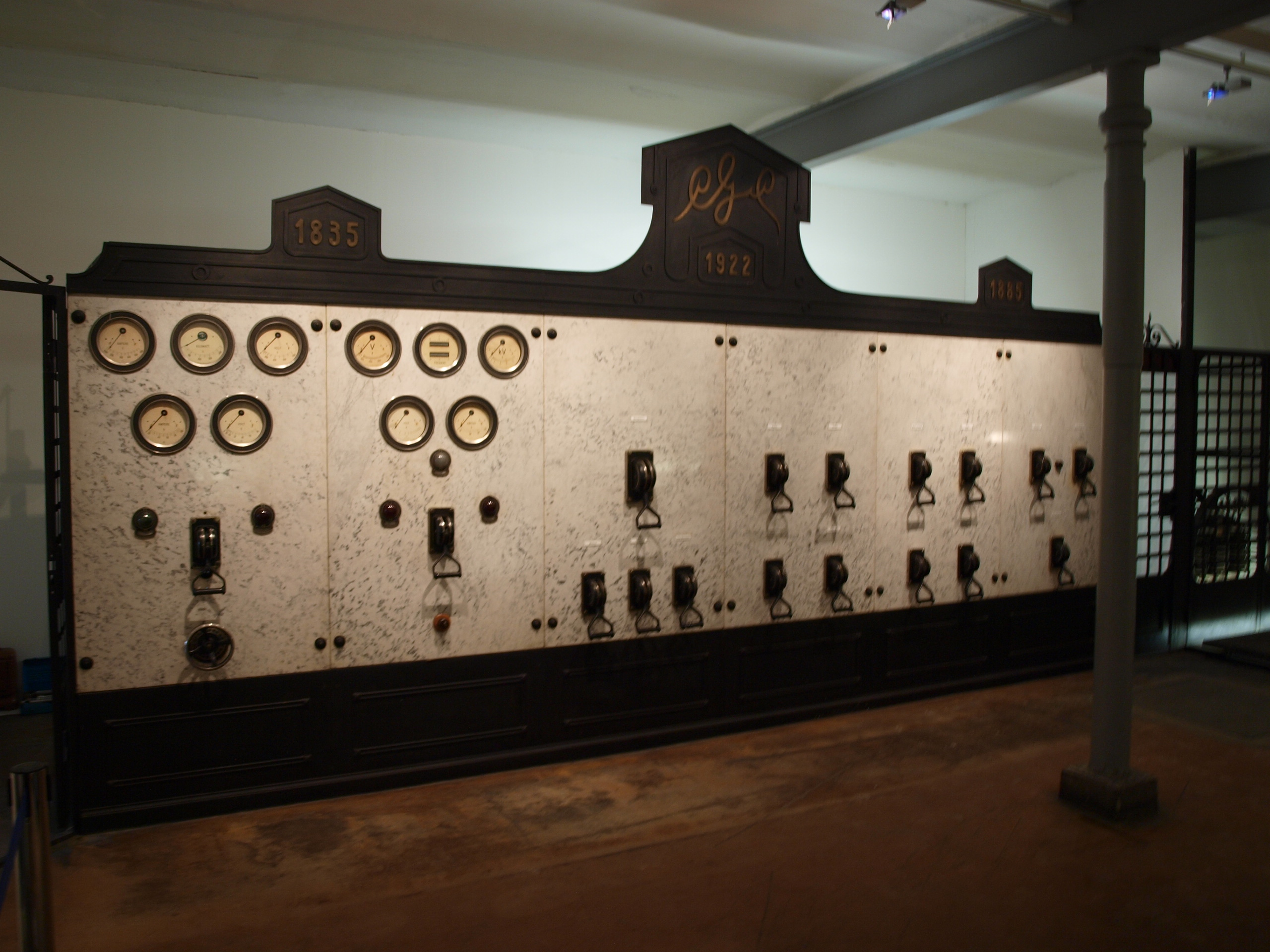 Schalttafel aus Marmor (als Isolationsmaterial) für die 320 kW-Francisturbine/Generator im Elektromuseum in Frastanz (UG).